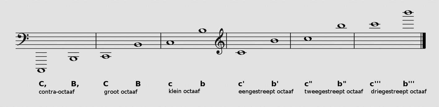 Toonhoogtenotatie volgens Helmholz